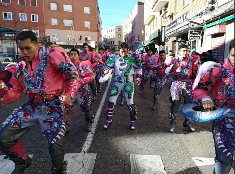 Cada año incrementan las personas que migran y se desplazan por todo el planeta, la Asamblea General de las Naciones Unidas proclamó el 18 de diciembre el día del migrante y la contribución que la migración aporta al desarrollo.